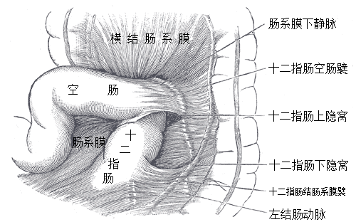 十二指肠上下隐窝（Poirier和Charpy）